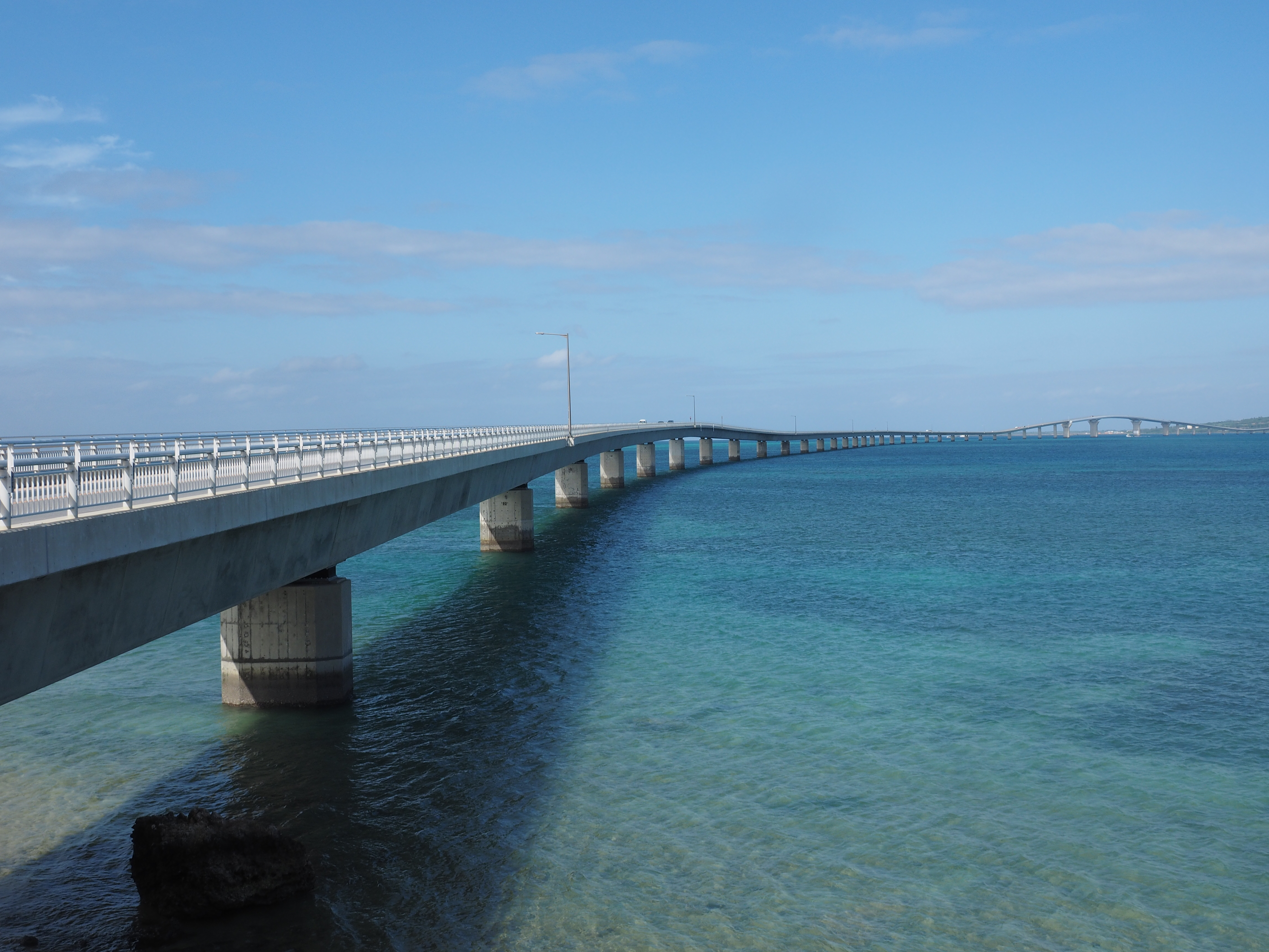 伊良部大橋（沖縄県宮古島市宮古島）